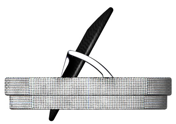 Эскиз аортального поворотно-дискового протеза клапана сердца